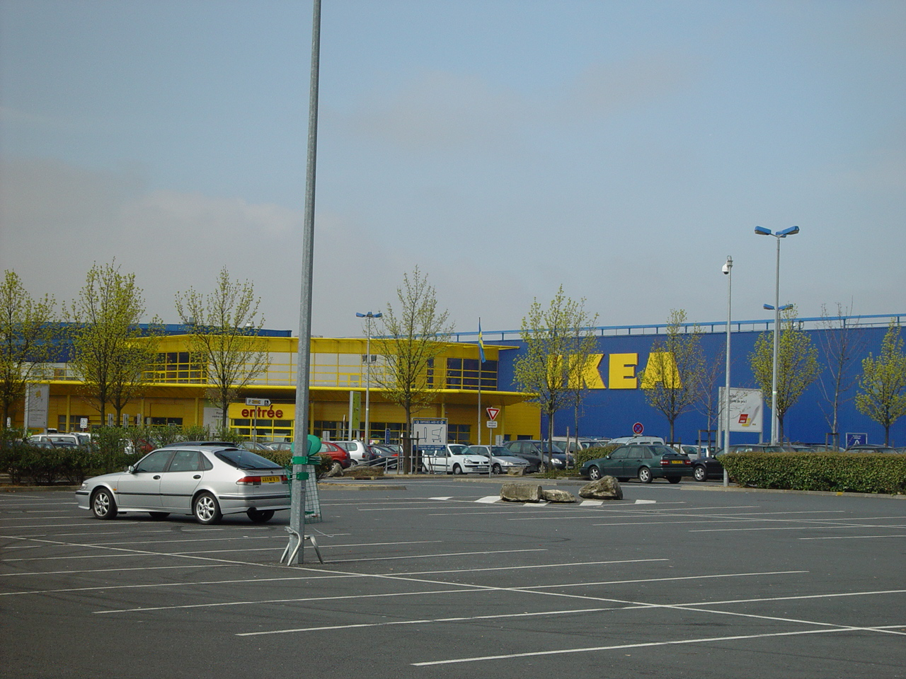 Magasin IKEA à Villepinte, France.